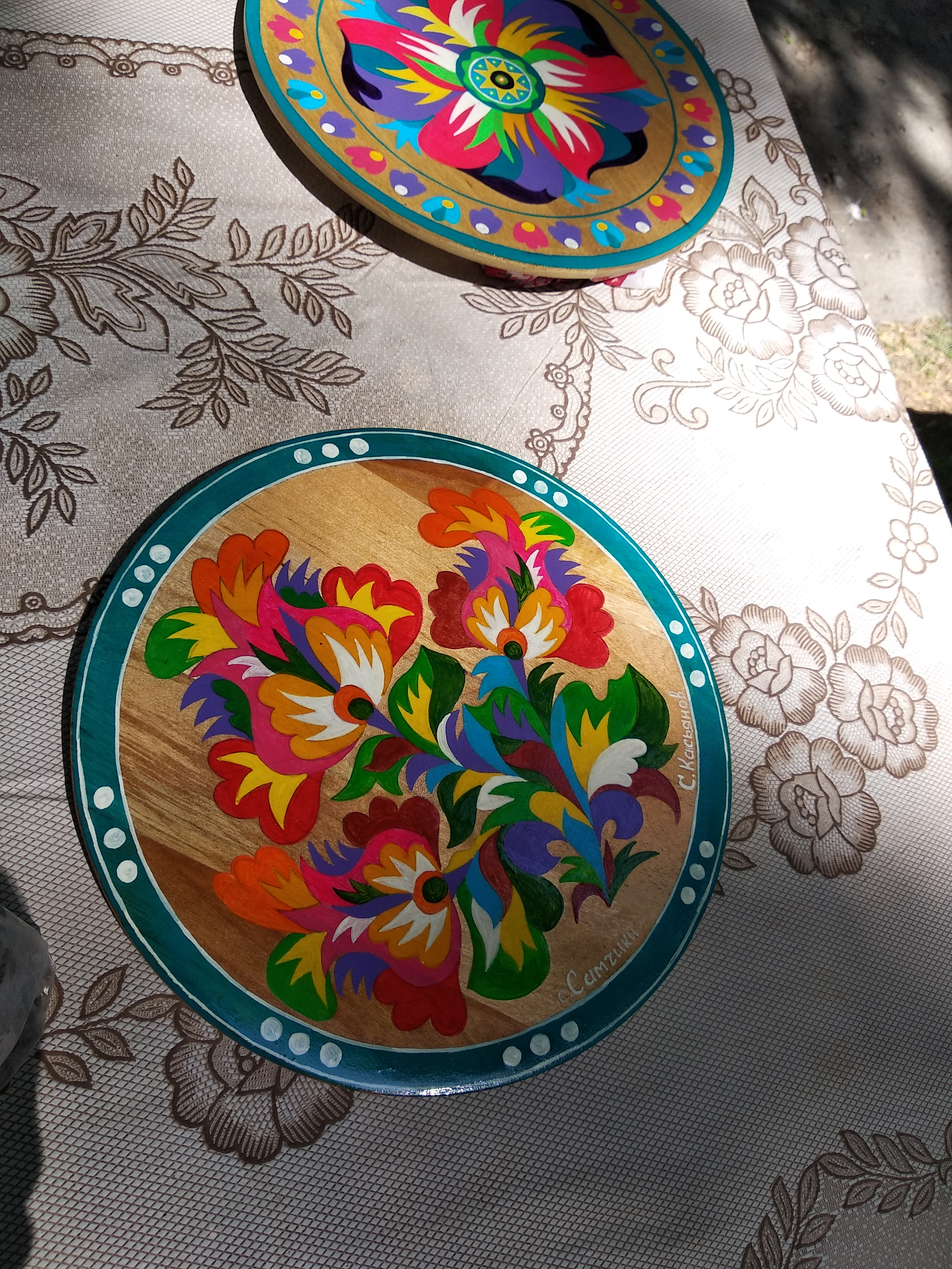 Самчиківський розпис